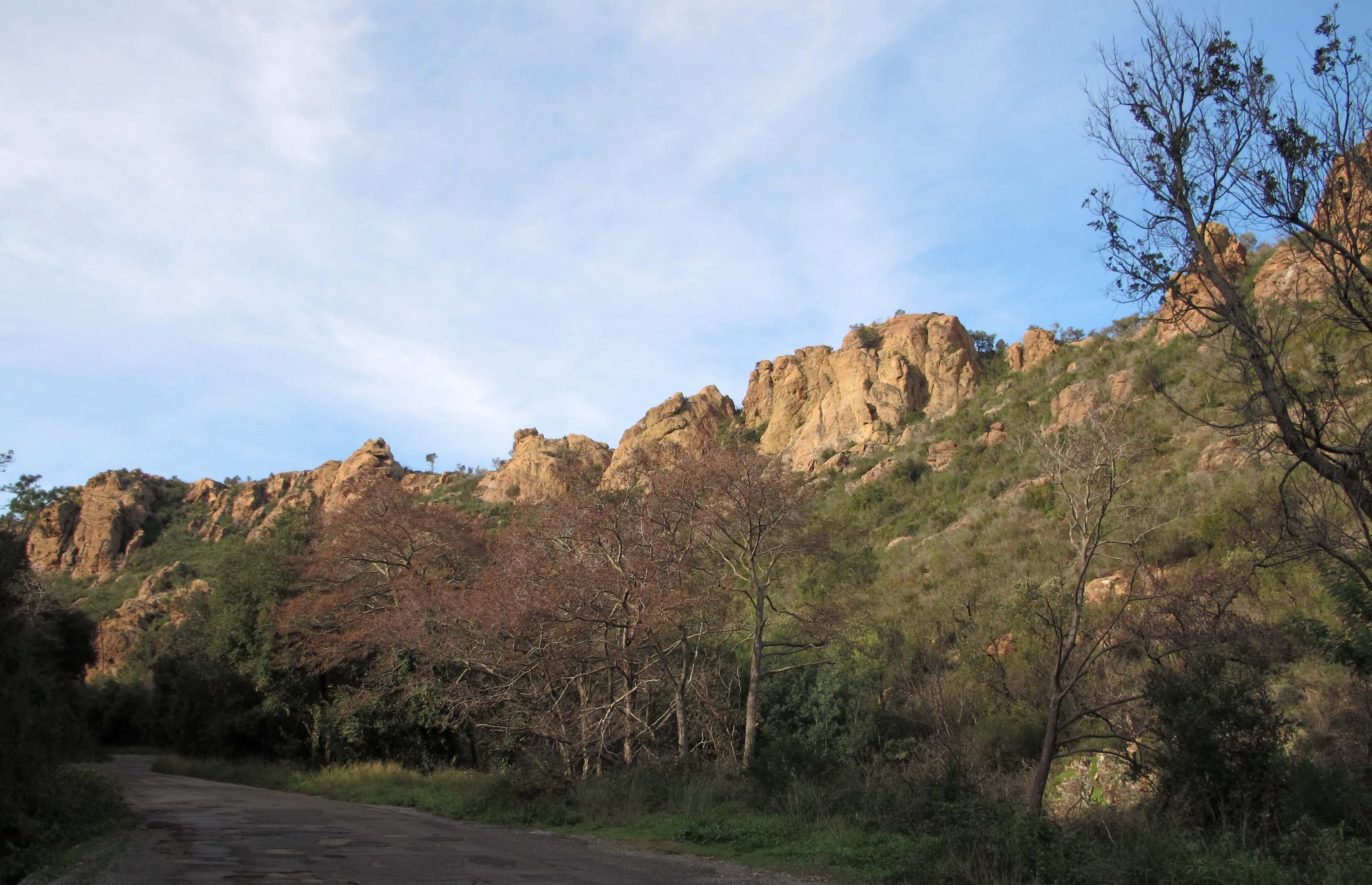 Vallon de la Rague, Mandelieu-La-Napoule, PACA, France